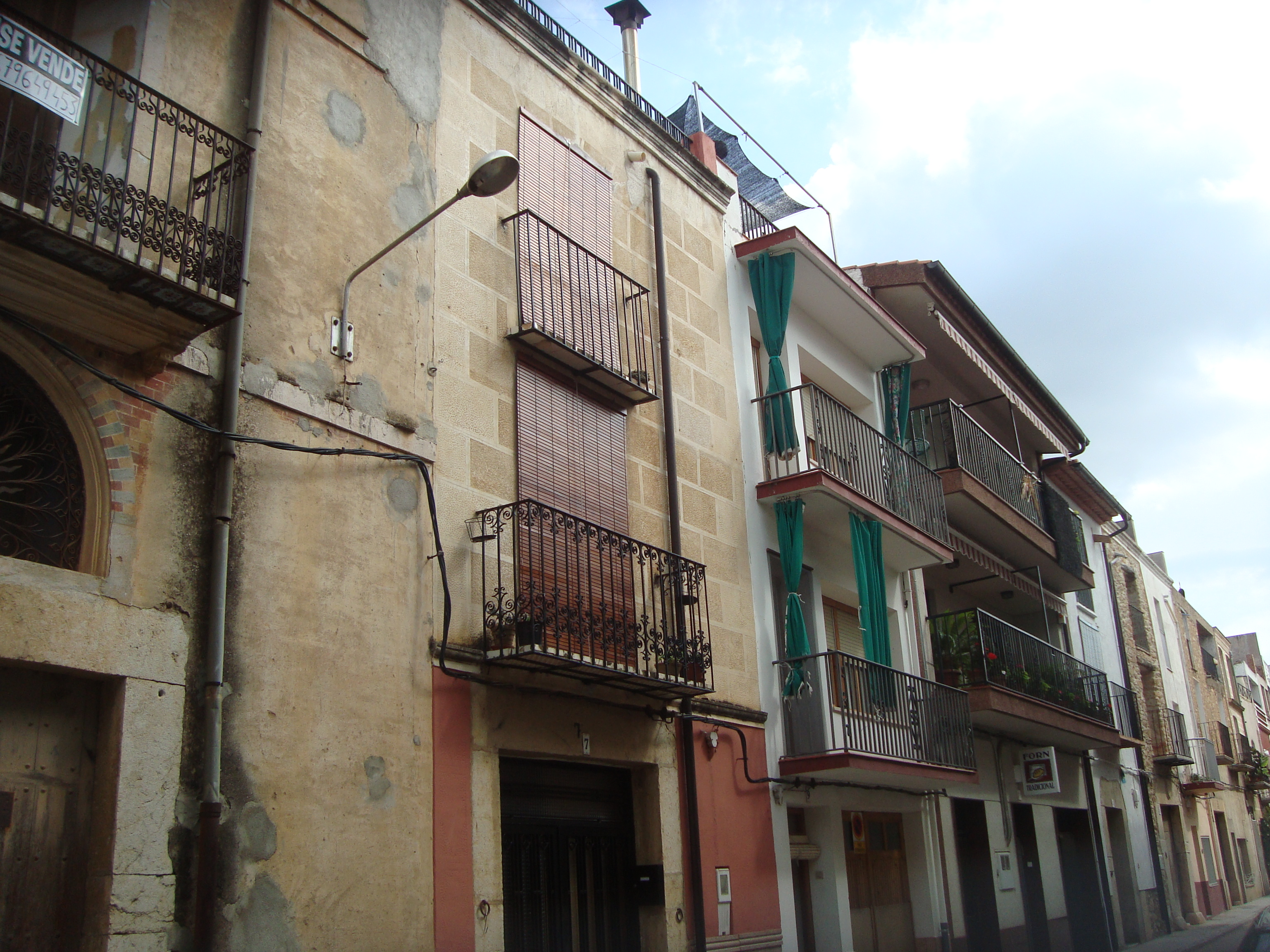 Carrer de Tírig